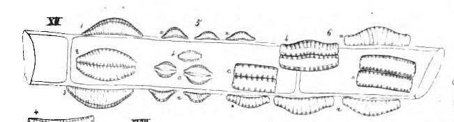 Epithemia westermanni (1-4), Epithemia sorex (5), Epithemia zebra (6) (współcześnie Epithemia adnata) na plesze gałęzatki. Skan z książki Friedricha Kützinga "Die Kieselschaligen Bacillarien oder Diatomeen" z 1844